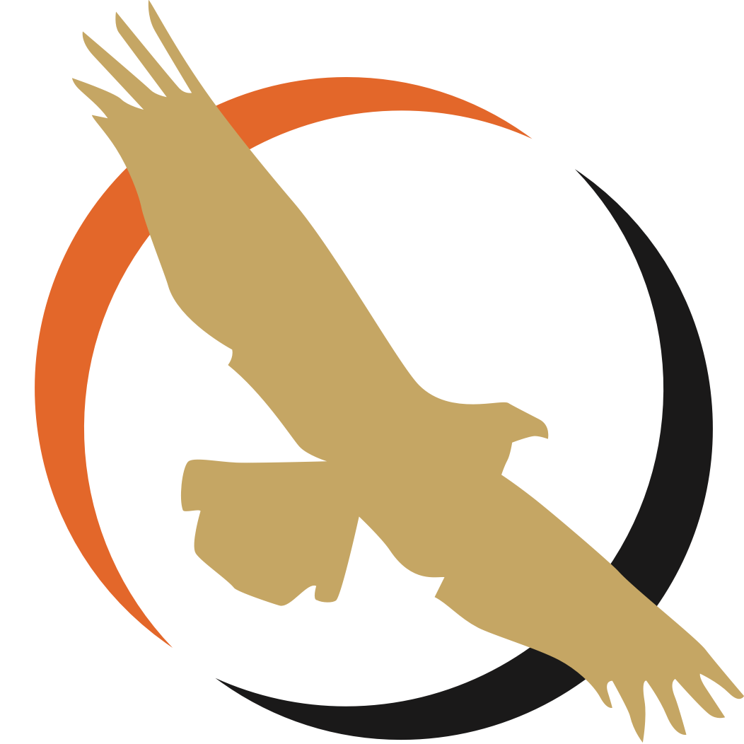 Эмблема Партии представляет собой композицию, в центральной части которой расположено изображение летящего орла цвета золота, обрамлённое извилистой и прерывистой линией окружности оранжевого цвета в левой верхней части и чёрного цвета в правой нижней части. Ниже изображения может находиться надпись, выполненная чёрными буквами равного кегля в две строки: «Либертарианская» и «партия», отцентрированными по горизонтали относительно изображения